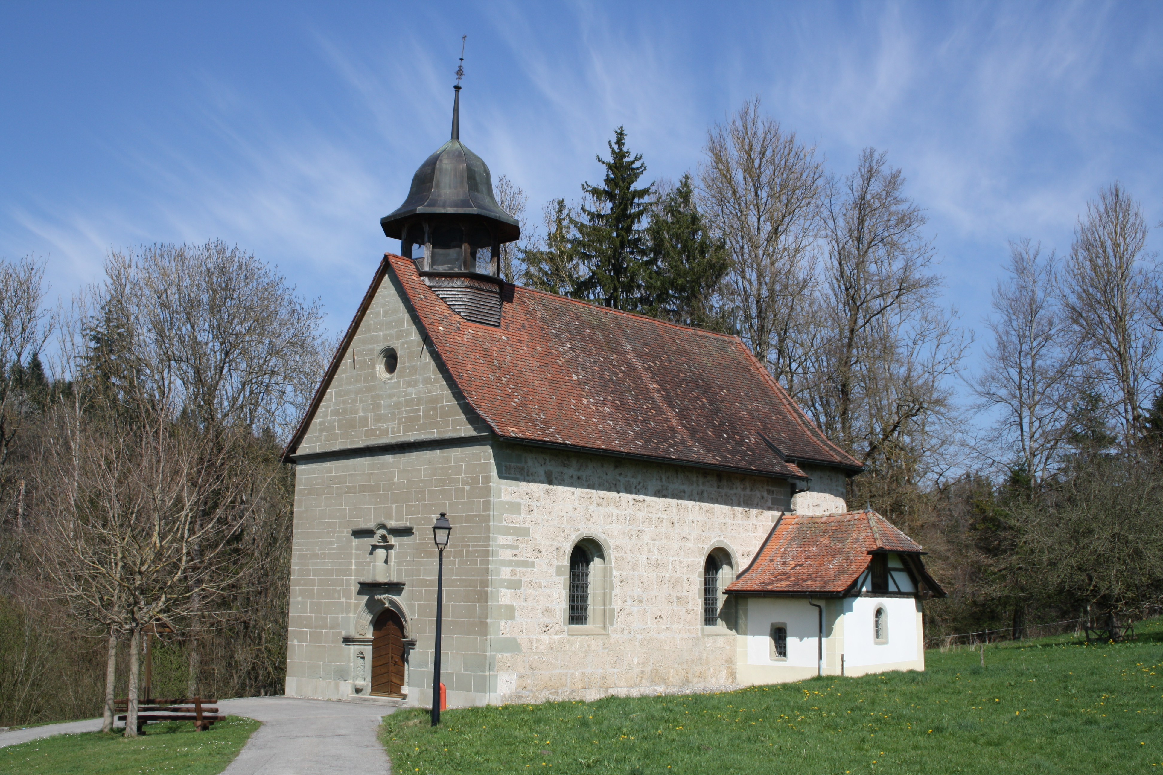 Chapelle de Posat, canton de Fribourg (Suisse)